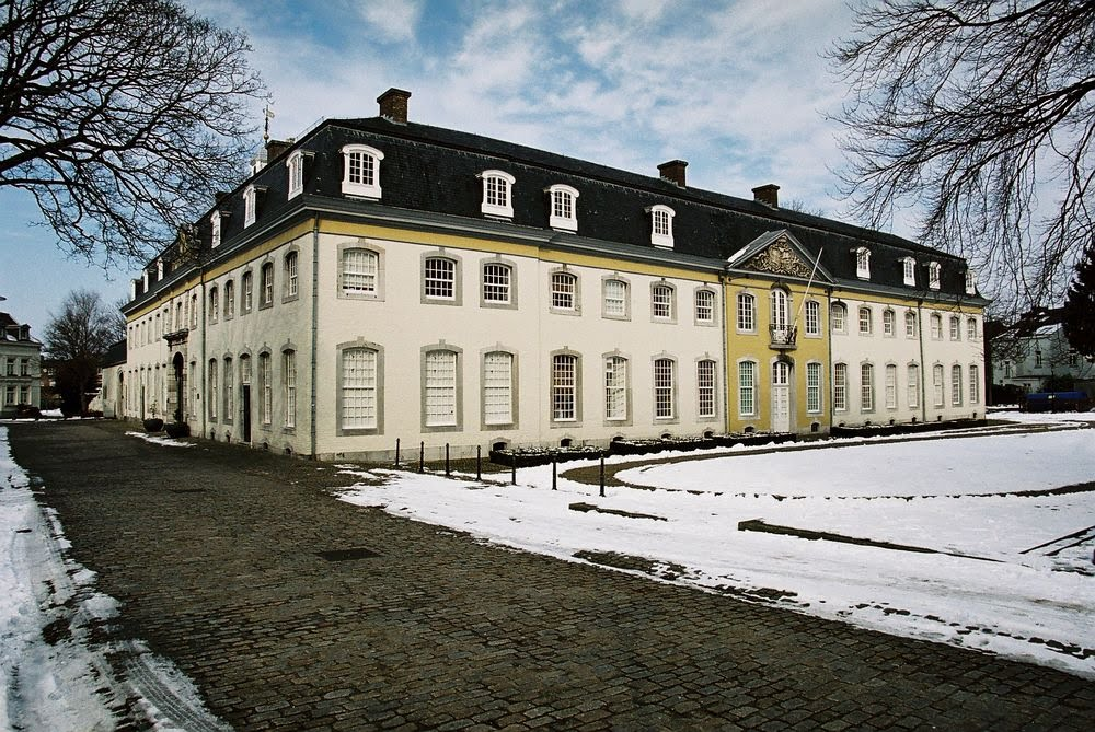 Het Von Clermonthuis te Vaals.